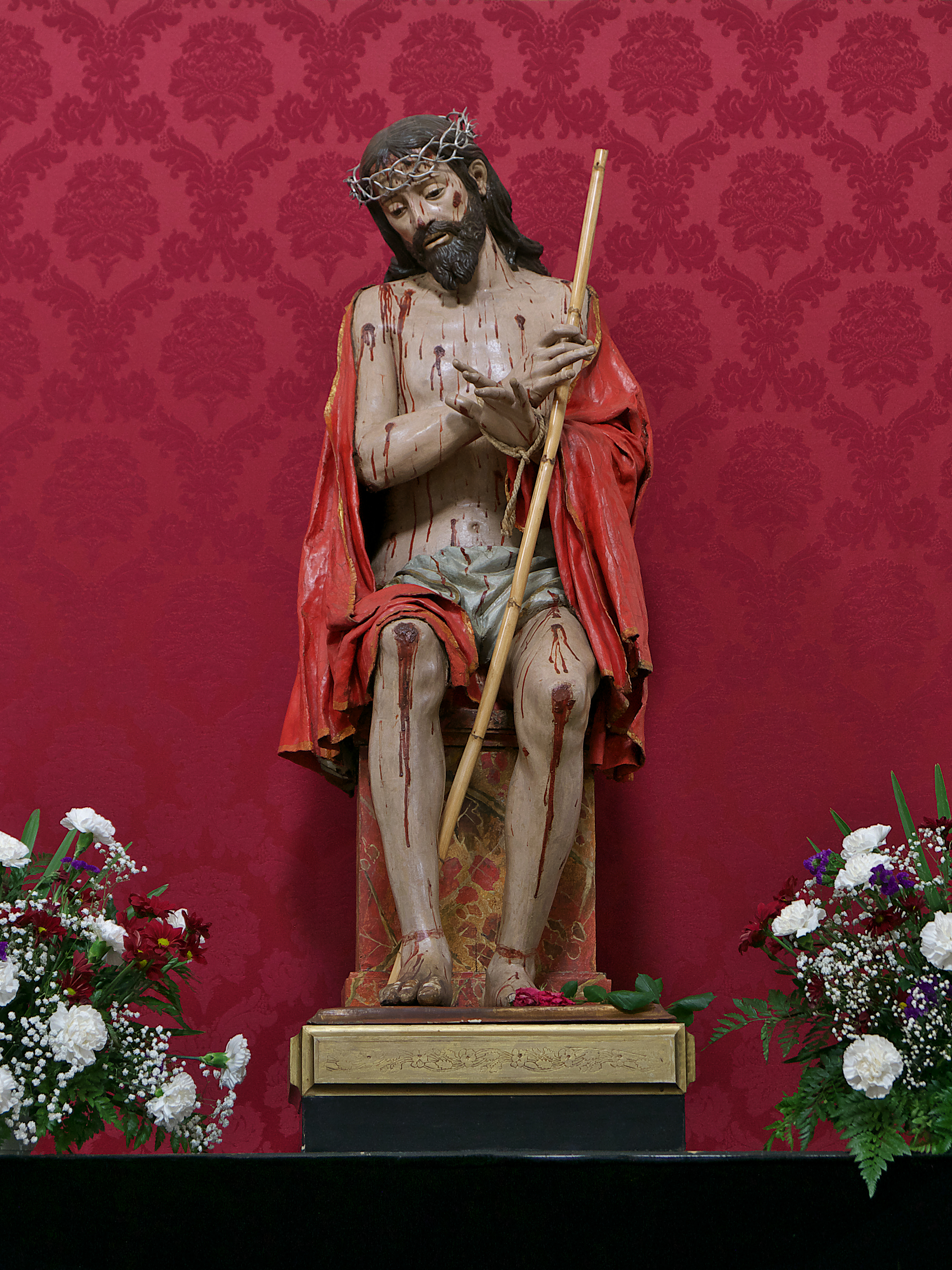 Imagen titular de la Muy Ilustre Cofradía Penitencial de Nuestra Señora de la Piedad, Valladolid. Ecce Homo de José de Rozas (1691)